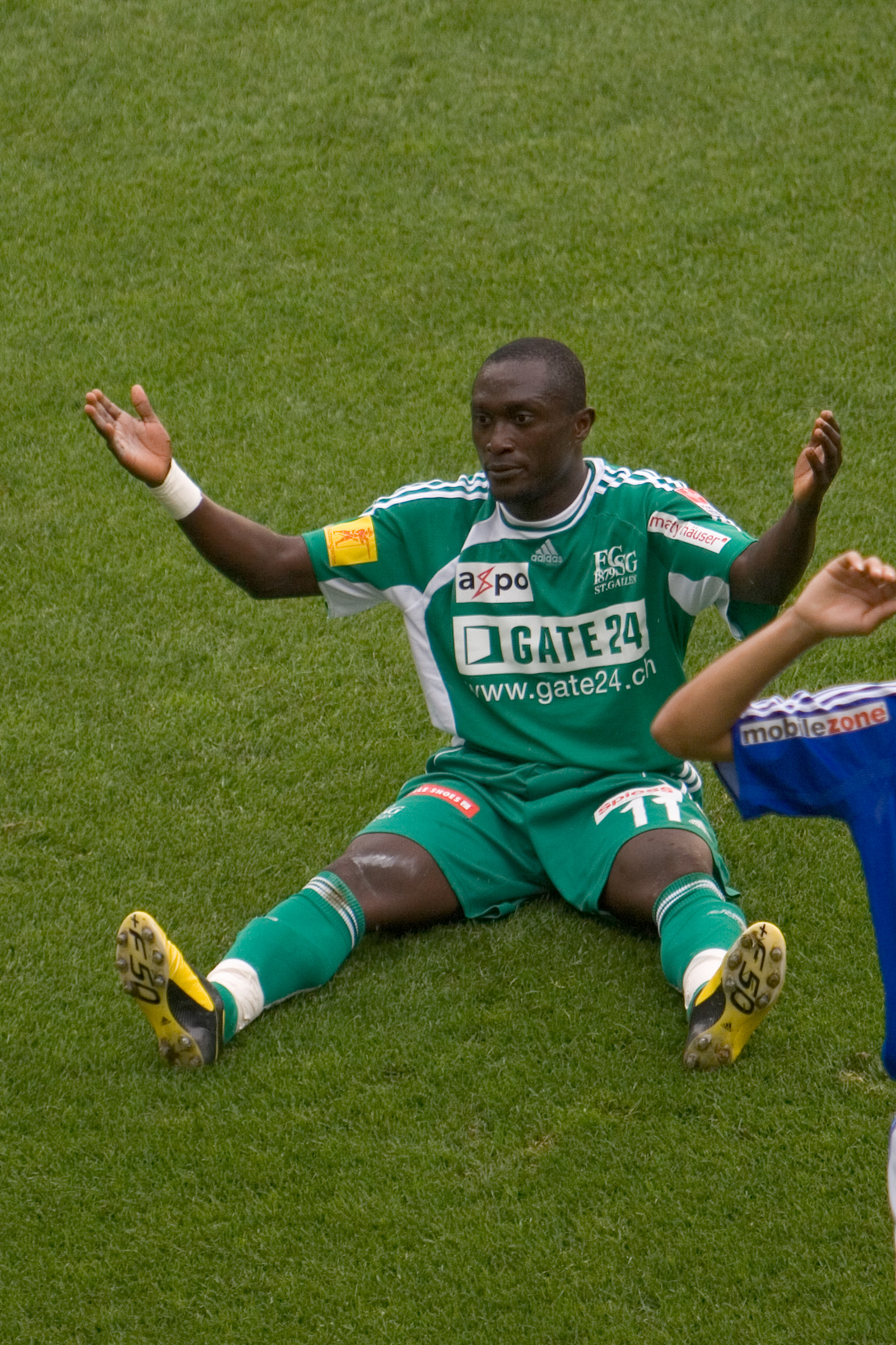 Alex Tachie-Mensah player FC St.Gallen